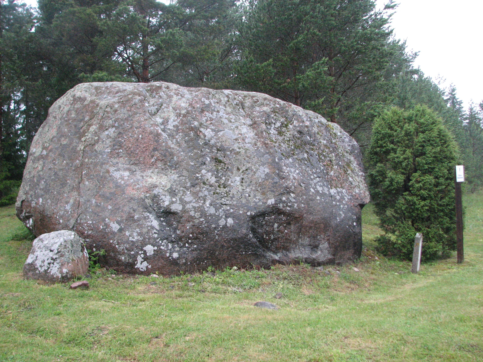 Tubala boulder, Estonia